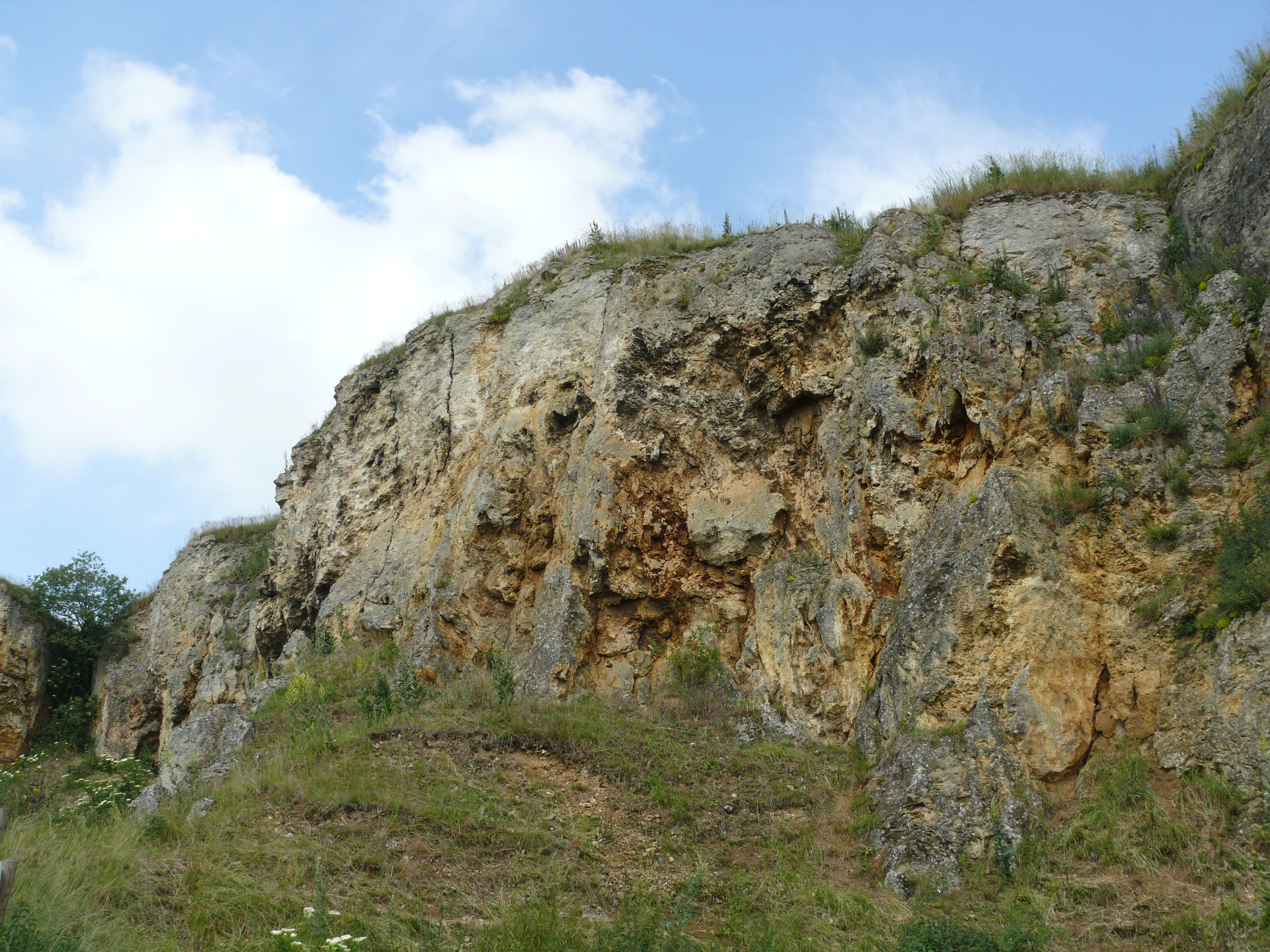 Tertiäre Riessee-Kalke, NSG Goldberg, Riesbürg, Deutschland Lebensraum von Megachile parietina